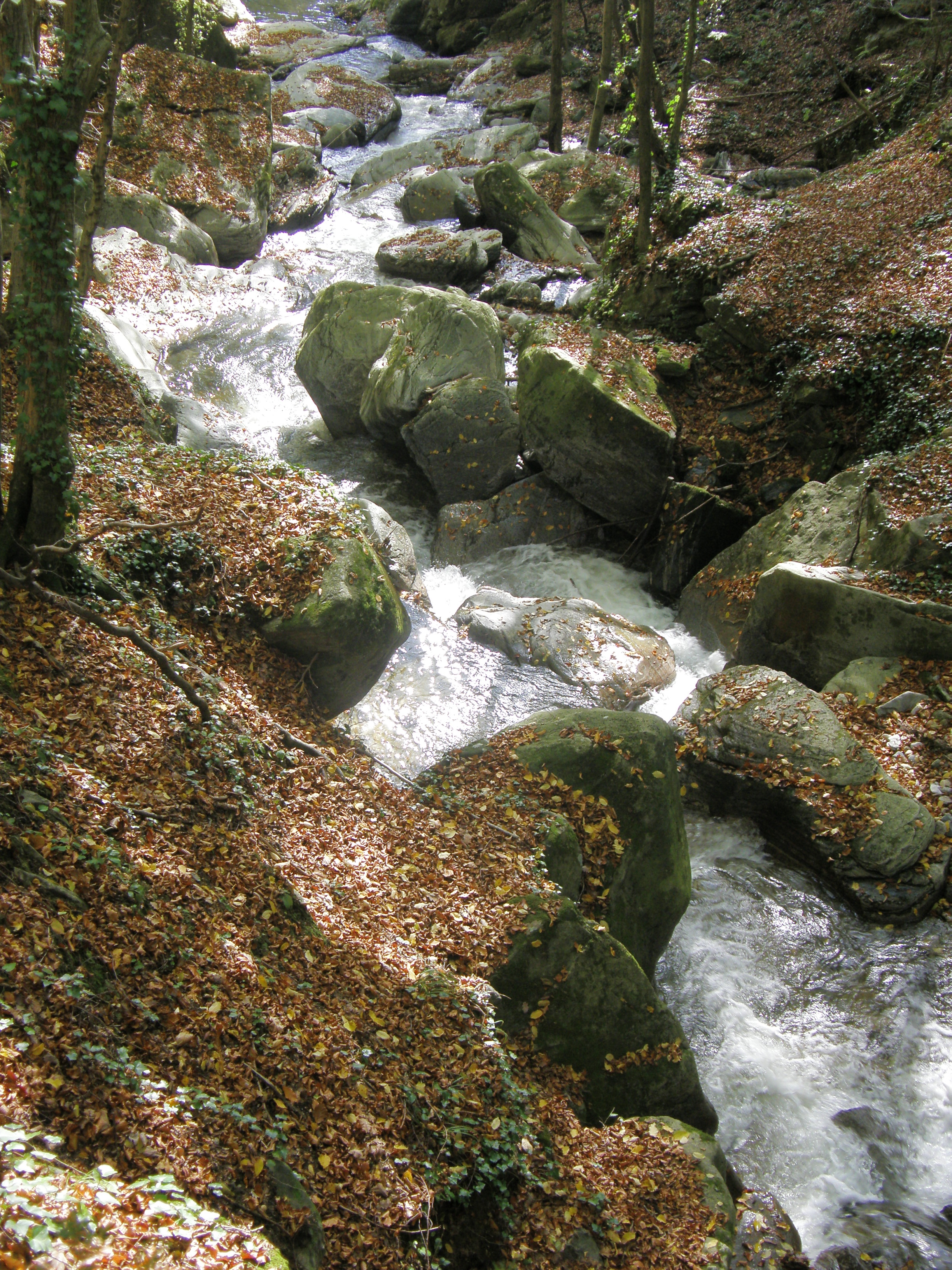 Potok Bistrica